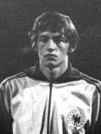 Friedhelm Haebermann, Edgar Schneider und Jürgen Kalb vor dem Amateur-Länderspiel am 7. September 1971 in München gegen Bulgarien